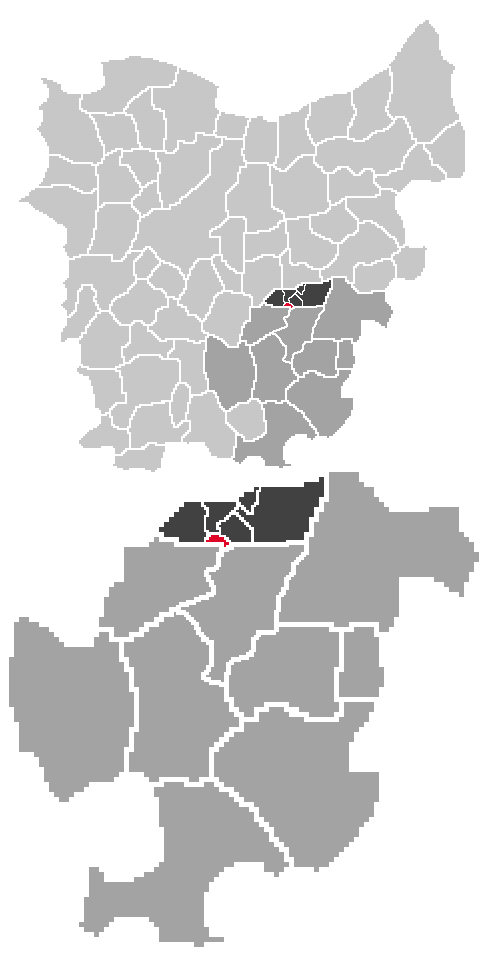 Oost-Vlaanderen uitgeknipt en bewerkt